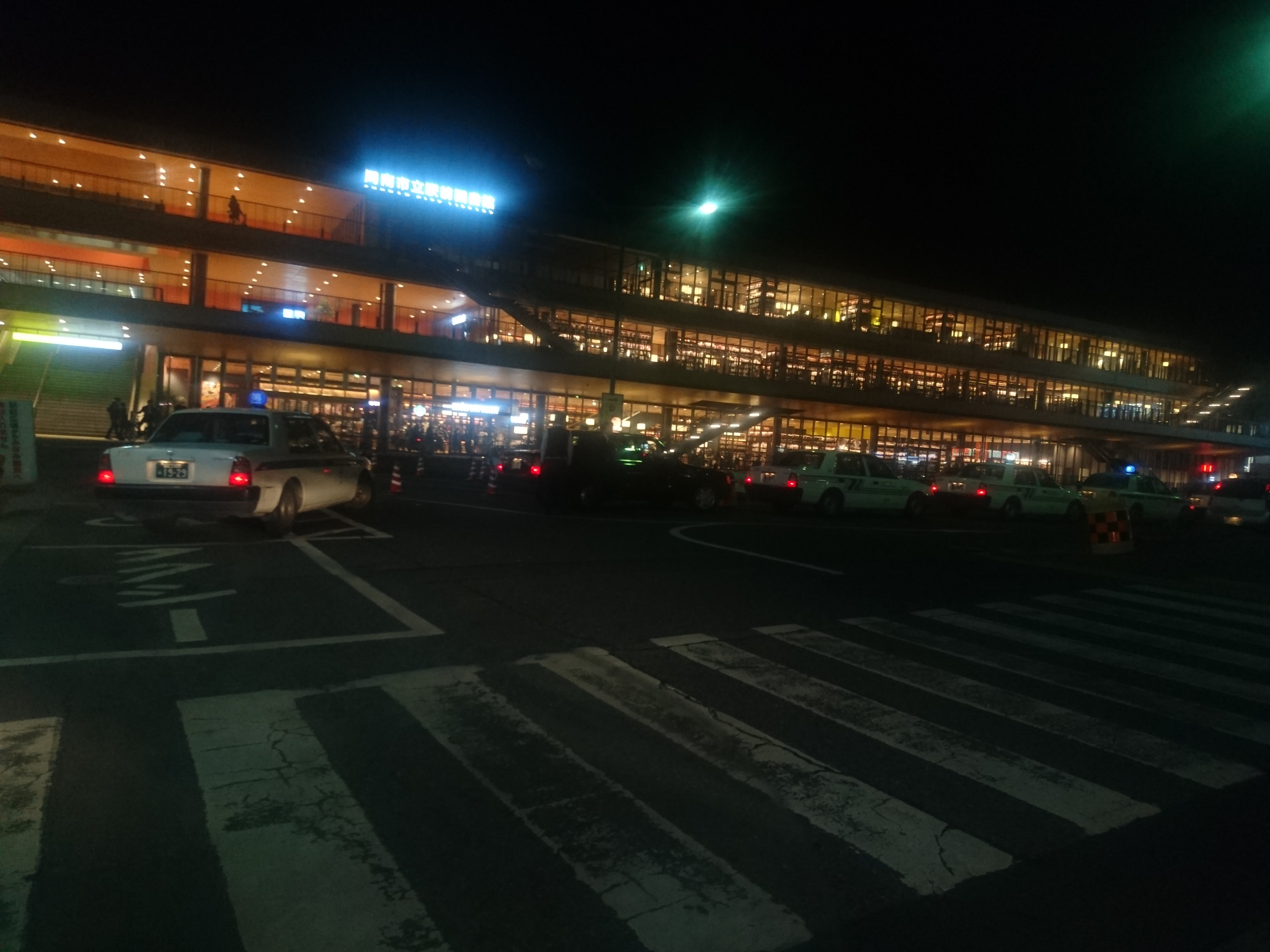 周南市立徳山駅前図書館